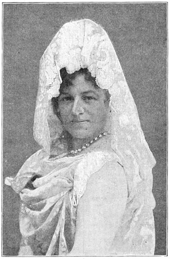 From book: Jane Dieulafoy. Van Toledo naar Granada. "De Aarde en haar volken," Jaargang 1906